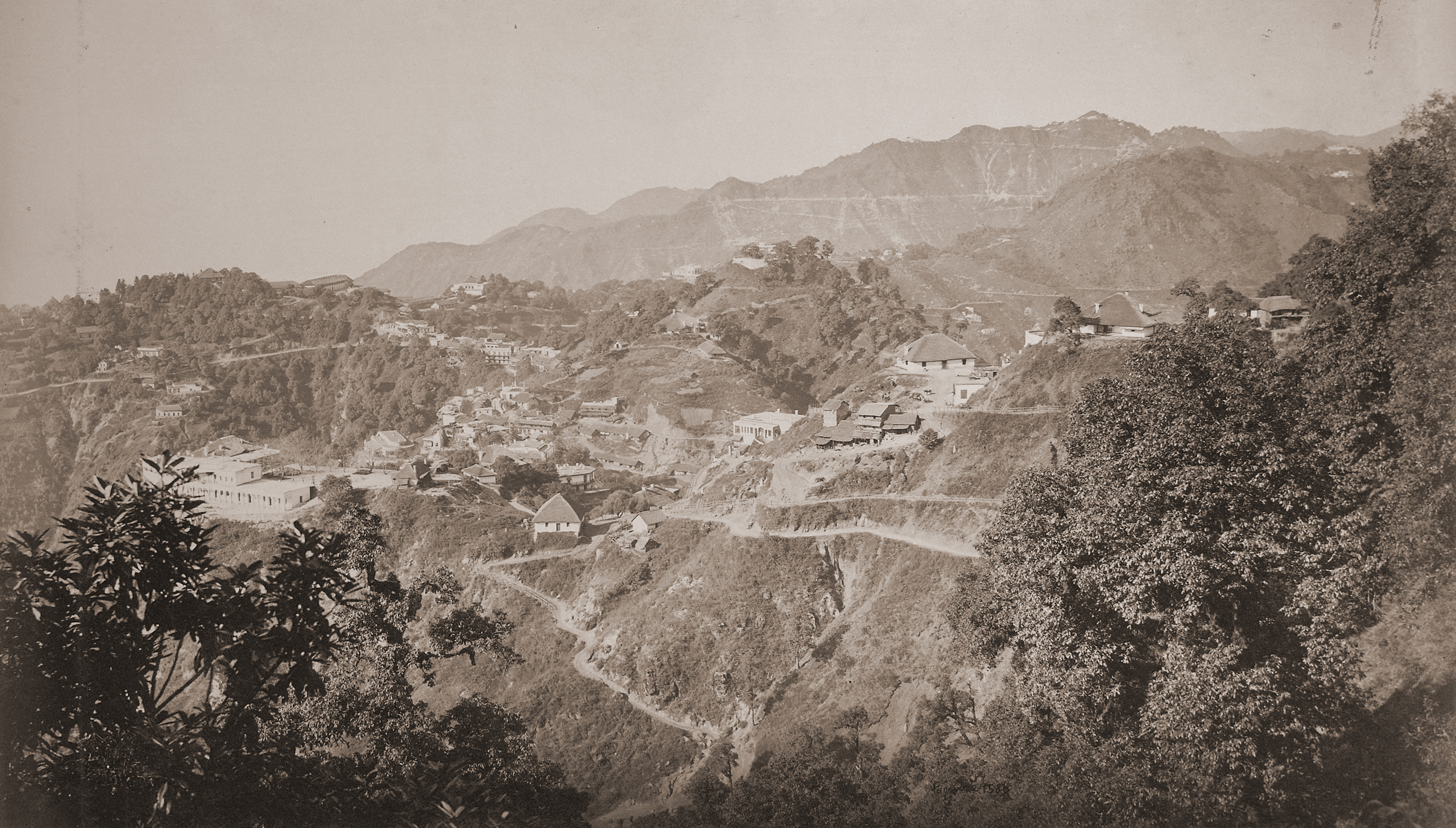 Mussoorie and Landour, 1860s.jpg